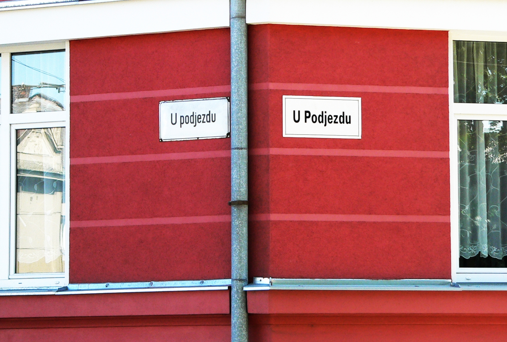 Dvě tabule s označením názvu téže ulice U Podjezdu (nová tabule, dle nového českého pravopisu platného od roku 1993) resp. U podjezdu (starší tabule, dle pravopisu platného do roku 1993) v Olomouci. Oficiální název ulice (dle registru RÚIAN) je stále „U podjezdu“. Object location49° 36′ 09.23″ N, 17° 16′ 39.59″ E